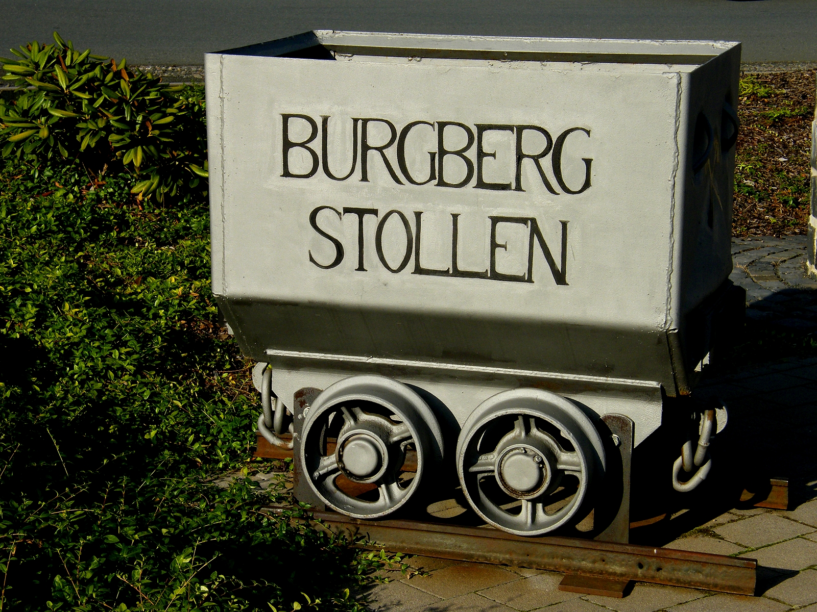 Battenberg (Eder) Lore Burgbergstollen